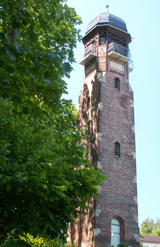 Fuchsturm oder Kaiser Wilhelm - Turm in Gera